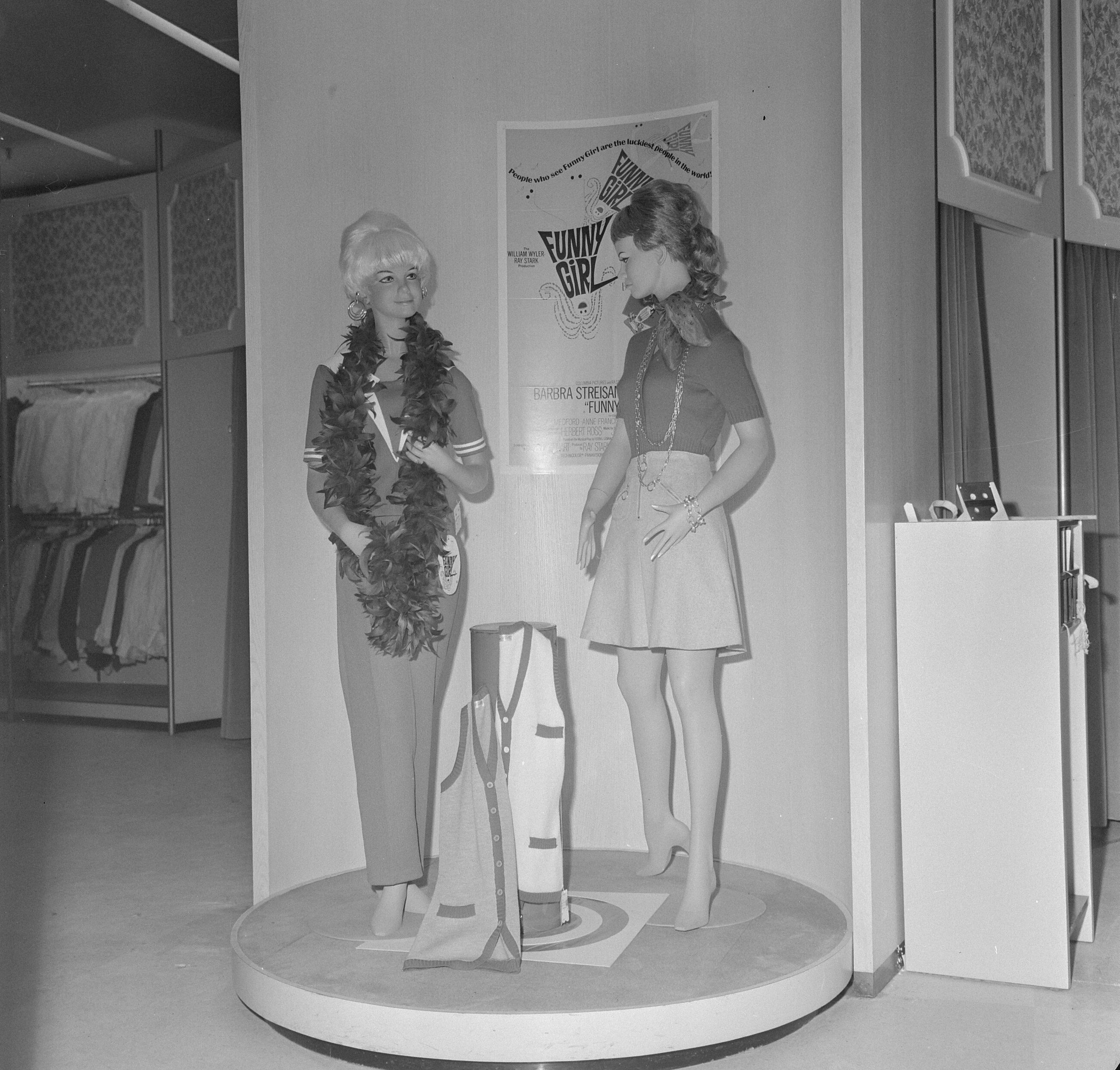 Collectie / Archief : Fotocollectie Anefo Reportage / Serie : [ onbekend ] Beschrijving : Serie. Reclamecampagne film "Funny Girl" (in Cinema Du Midi te Amsterdam). Etalage van De Bijenkorf Datum : 28 februari 1969 Locatie : Amsterdam, Noord-Holland Trefwoorden : etalages, films, reclame Persoonsnaam : De Bijenkorf Fotograaf : Mieremet, Rob / Anefo Auteursrechthebbende : Nationaal Archief Materiaalsoort : Negatief (zwart/wit) Nummer archiefinventaris : bekijk toegang 2.24.01.03 Bestanddeelnummer : 922-1480